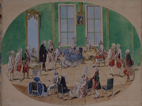 Grand Duke Pavel Petrovich and Grand Duchess Maria Fyodorovna in Vienna in 1782 State A. Pushkin Museum of Fine Arts, Moscow Новый год в Вене. Раскрашенная гравюра И. Лошенколя. Около 1782 года. Великая княгиня Мария Федоровна — на переднем плане вторая справа; великий князь Павел Петрович и император Иосиф II — сидят на заднем плане.